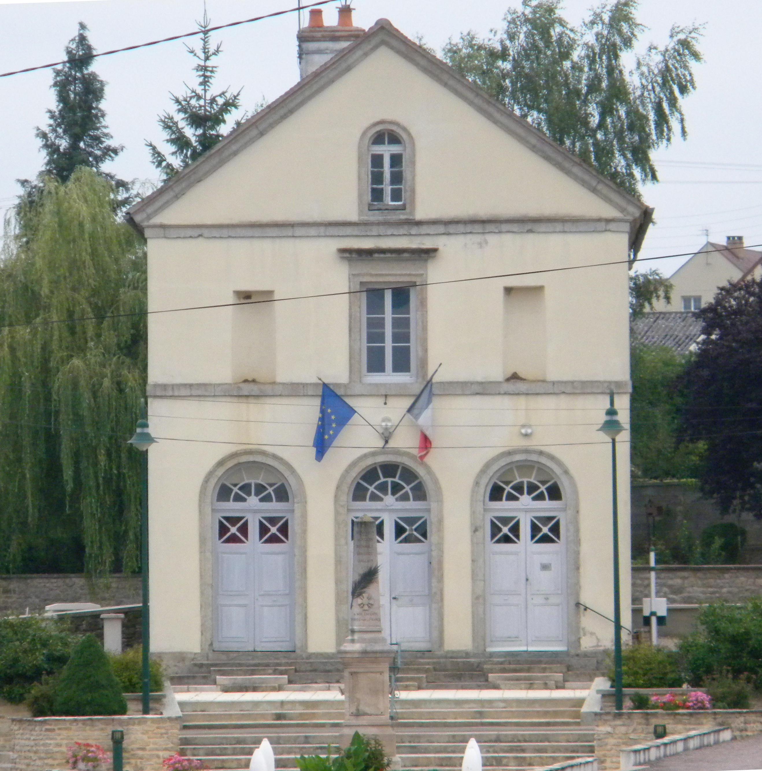 Mairie de Saint-Euphrône